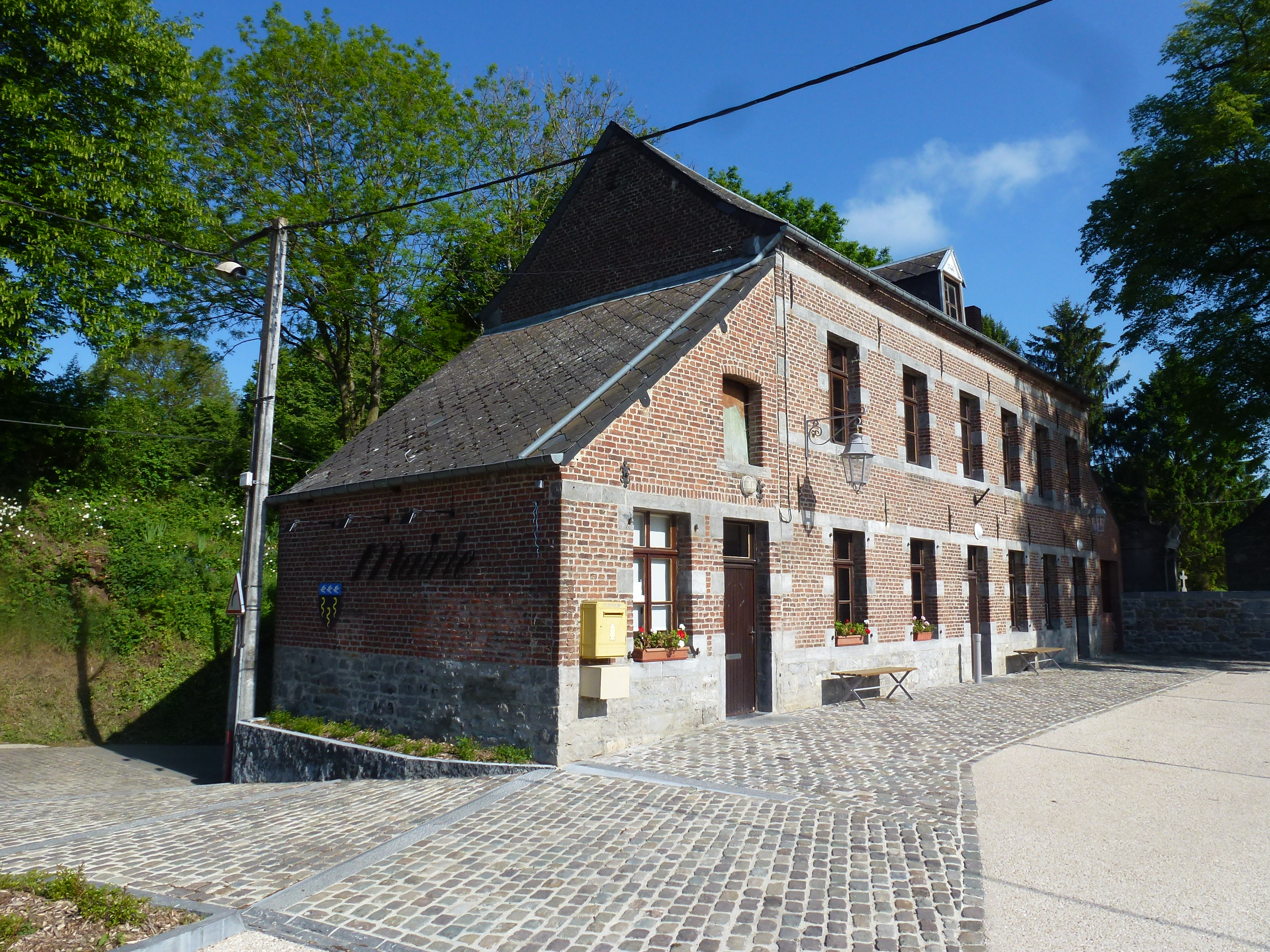 La mairie de Quiévelon.- Nord.- France.